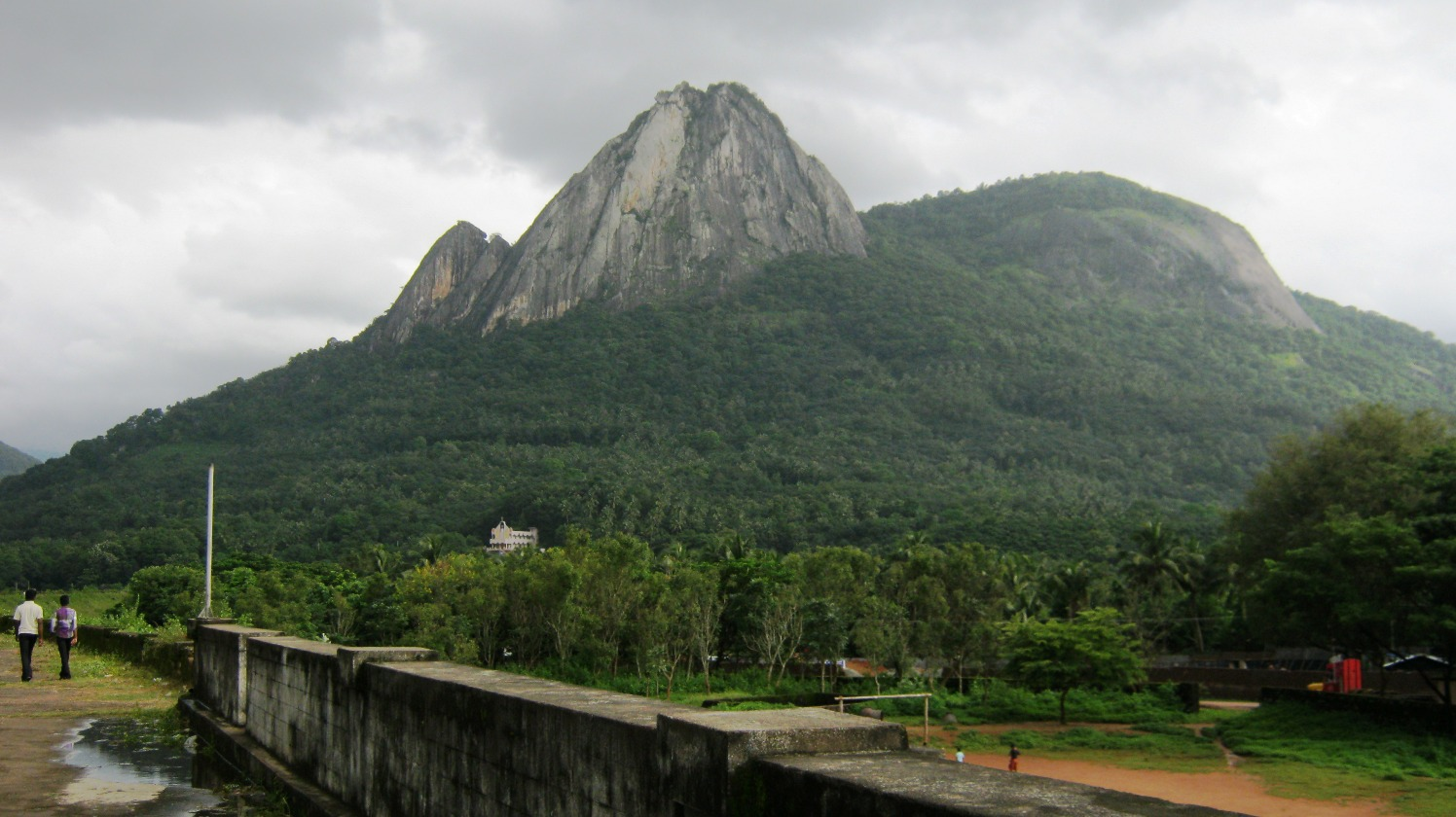 Shiruvani Hills